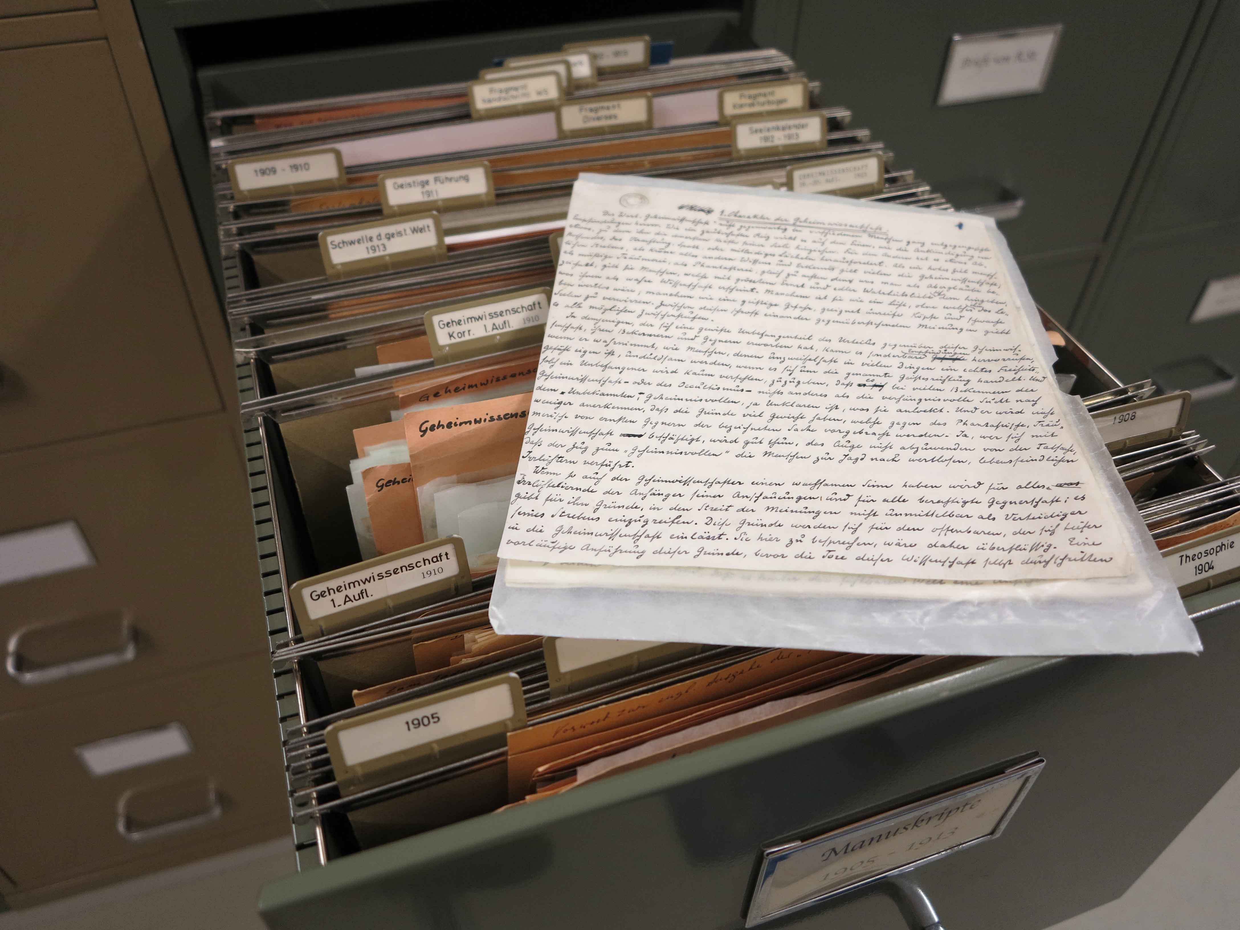 Manuskript